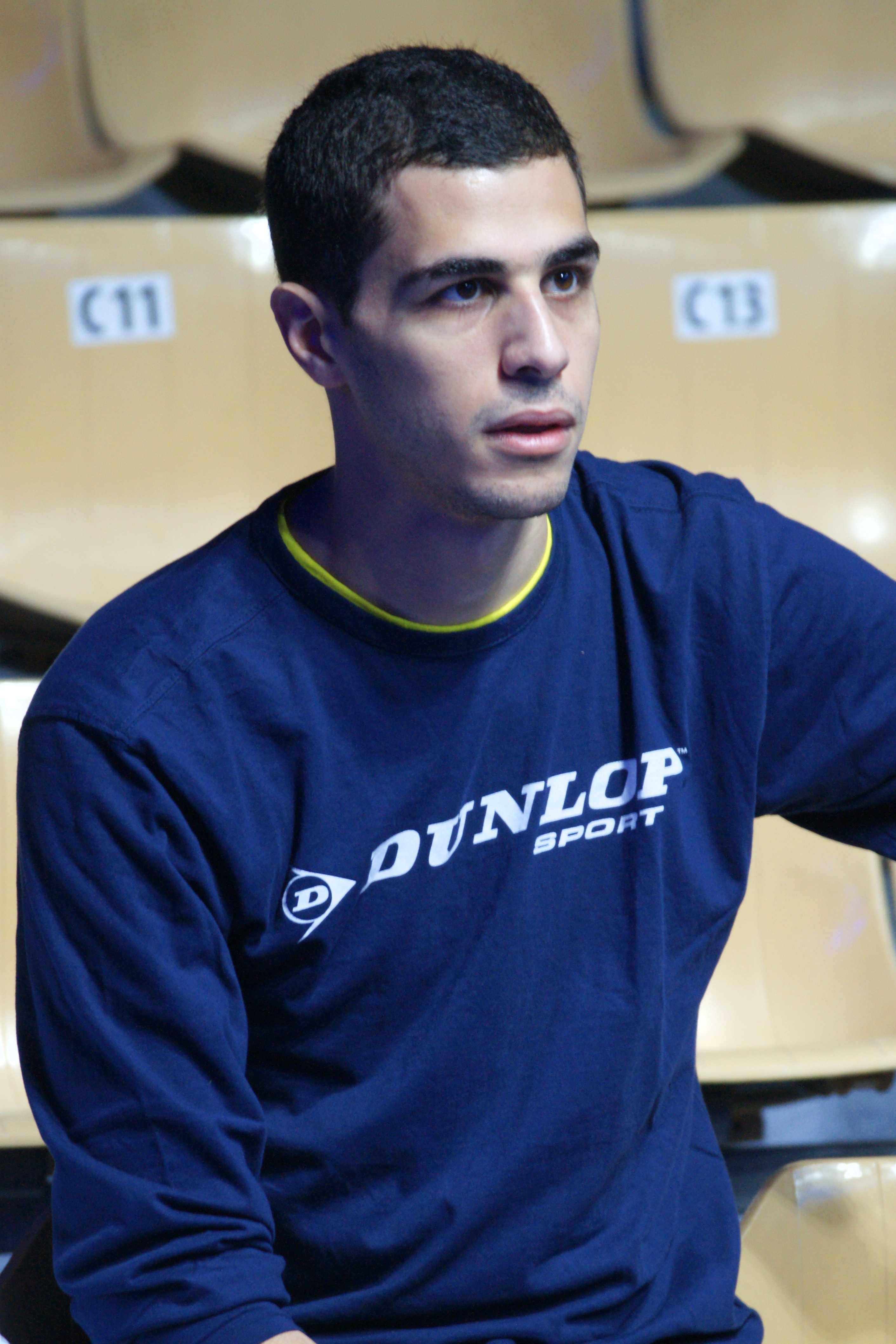 Ali Farag, championnats du monde de squash par équipe Marseille 2017